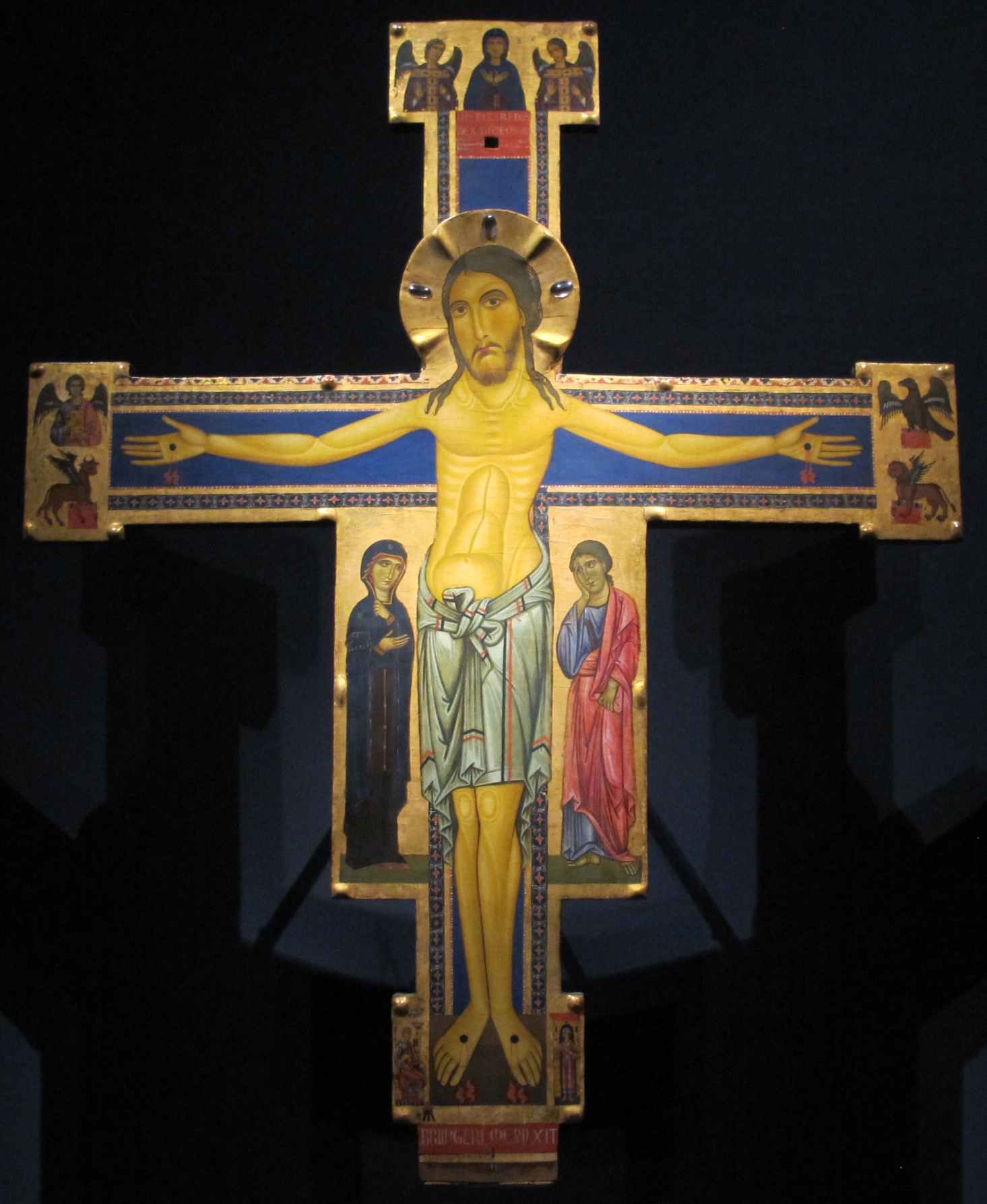 Museo nazionale di Villa Guinigi - MIBAC This is a photo of a monument which is part of cultural heritage of Italy.